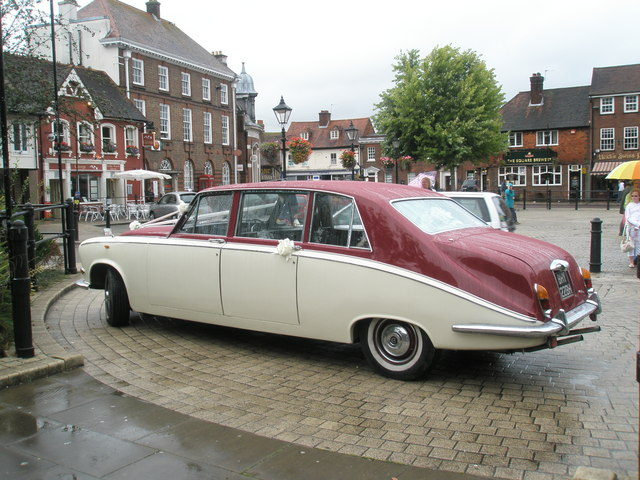 Magnificent car outside St Peter's